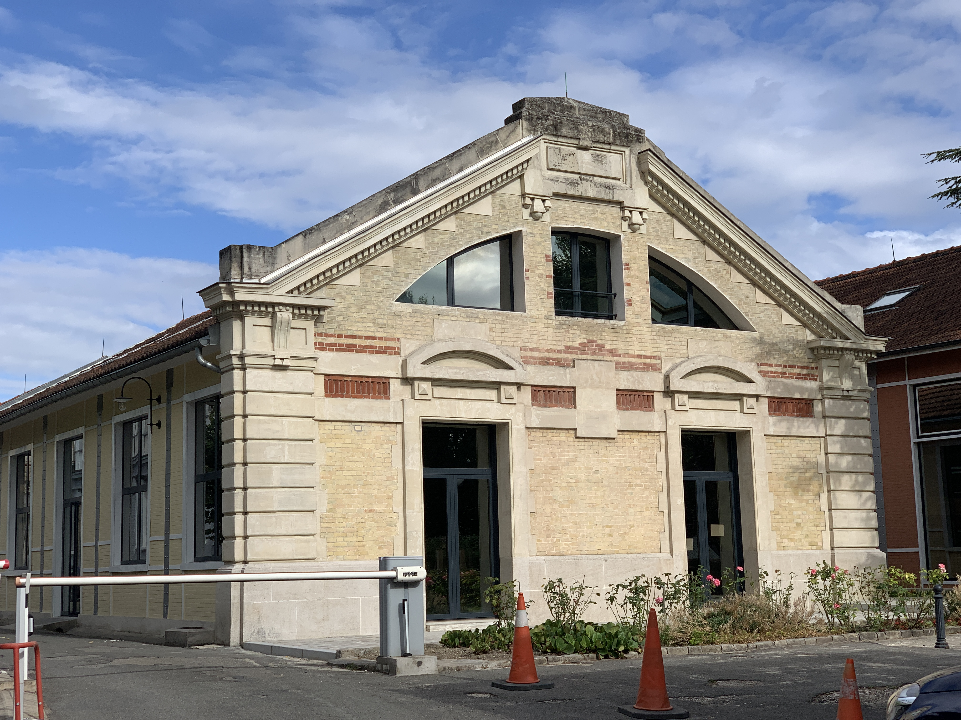 Studios de Joinville, Joinville-le-Pont.